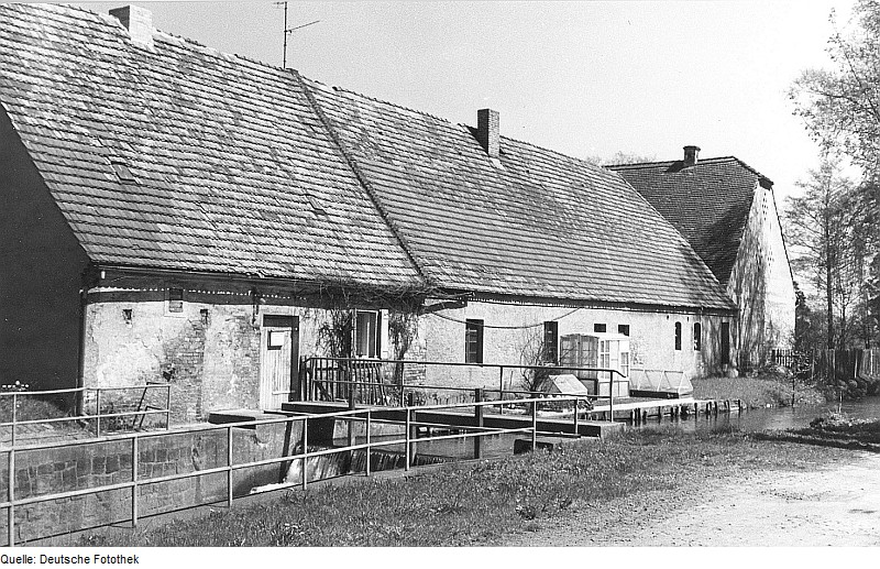 Original image description from the Deutsche Fotothek Rietschen-Daubitz. Ehem. Mühle an der Südseite des ehem. Rittergutes